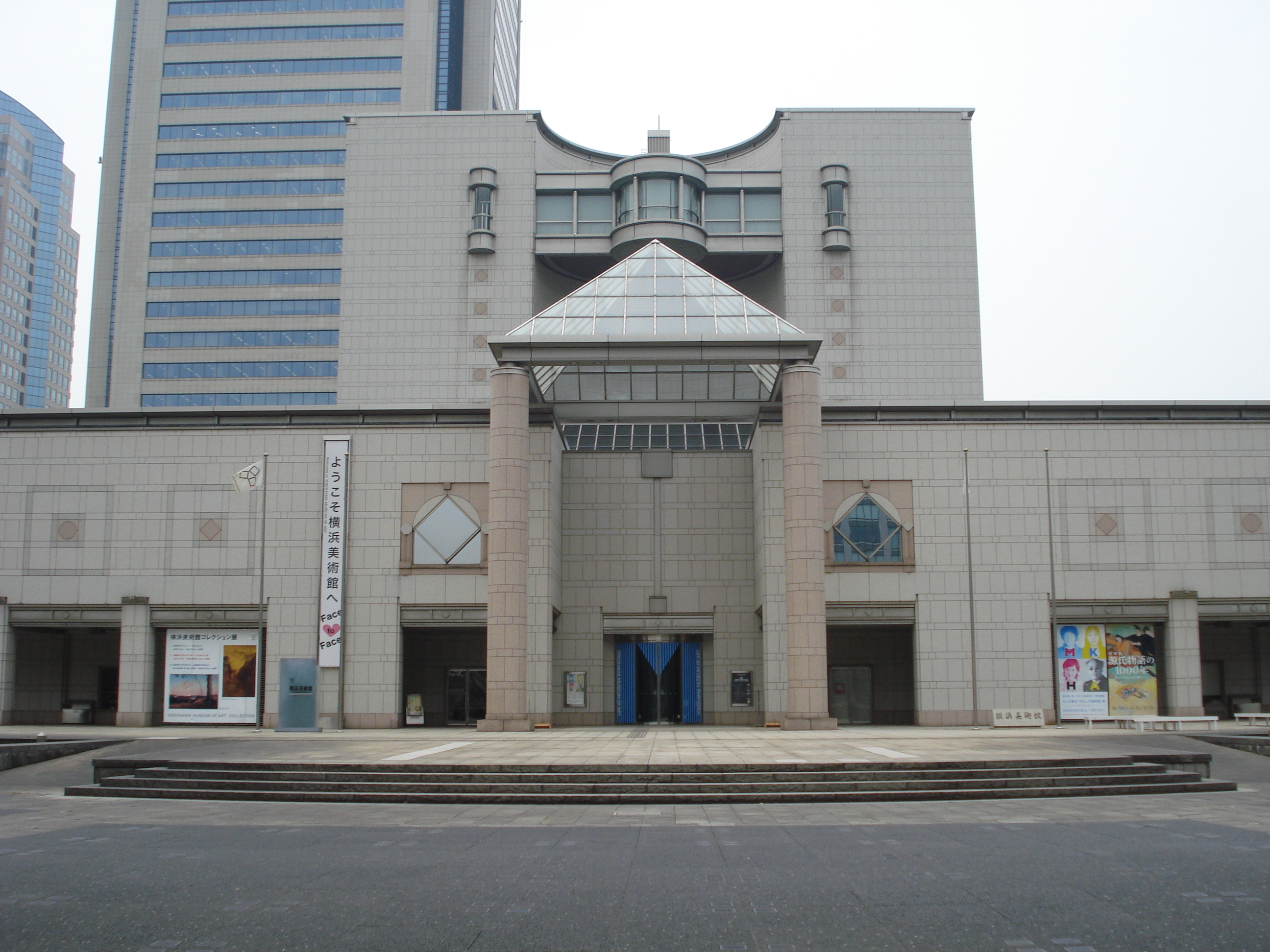 yokohama museum of art